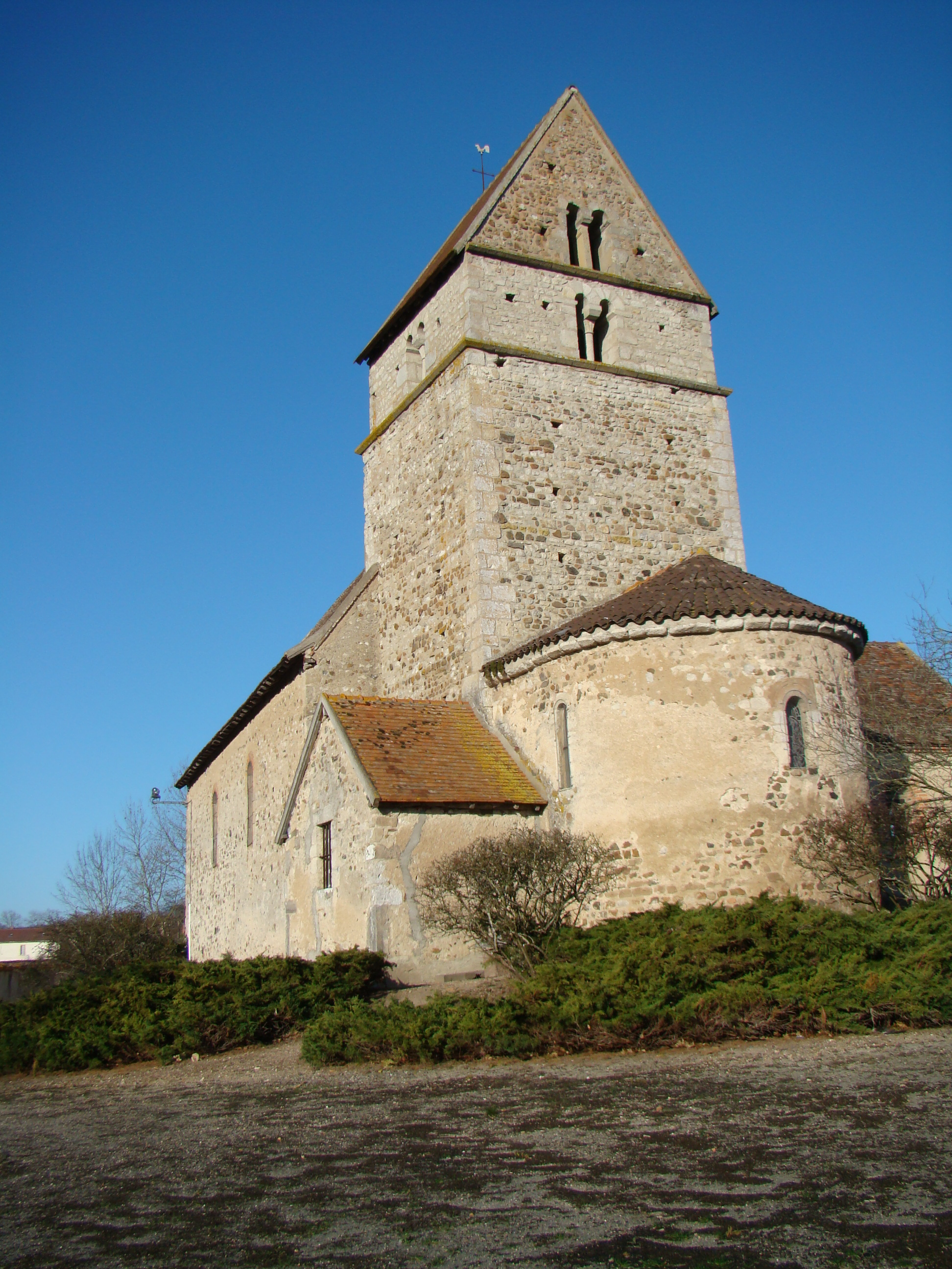 Visite de l'église tous les jours de 9h à 17h.